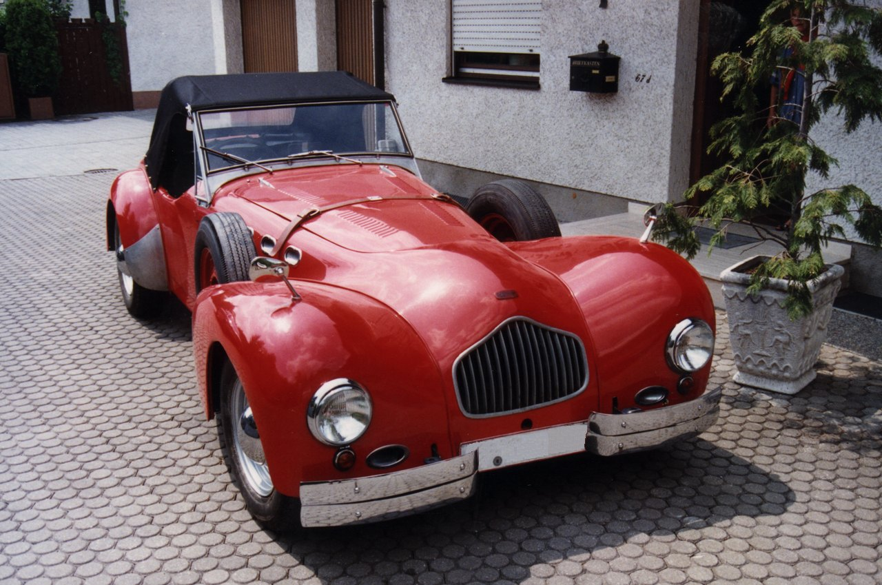 Quelle: Harald H. Linz Fotograf: Harald H. Linz Mit ausdrücklicher Genehmigung von Harald. H. Linz für Wiki eingestellt.